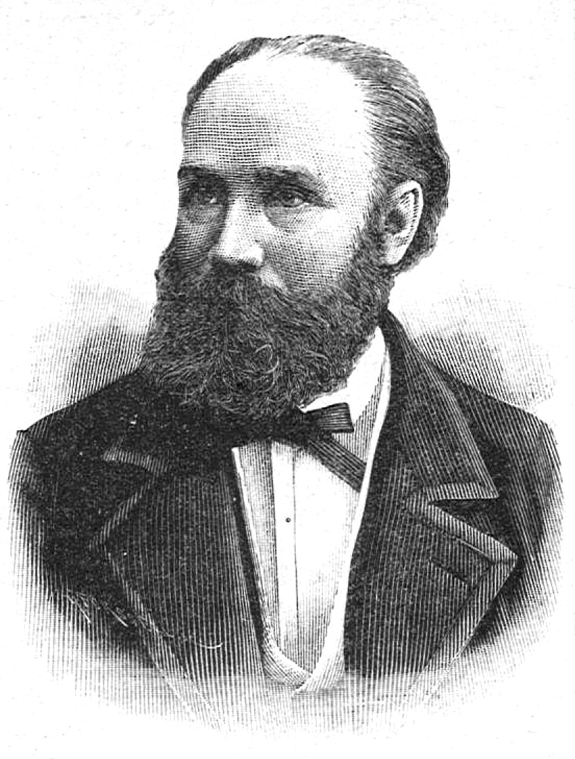 Oscar Stackelberg (1824-1888)